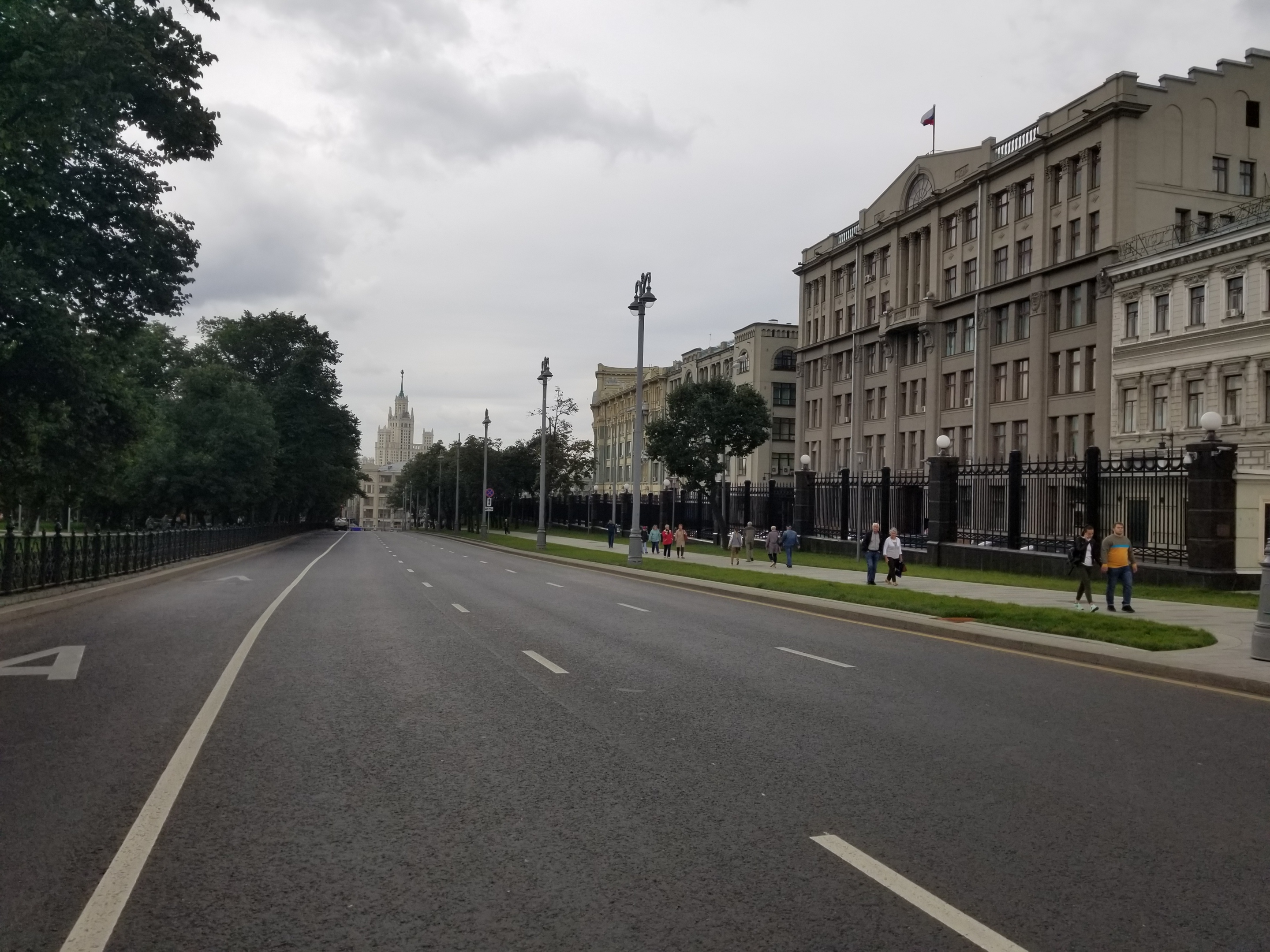 Старая площадь (сентябрь 2017)